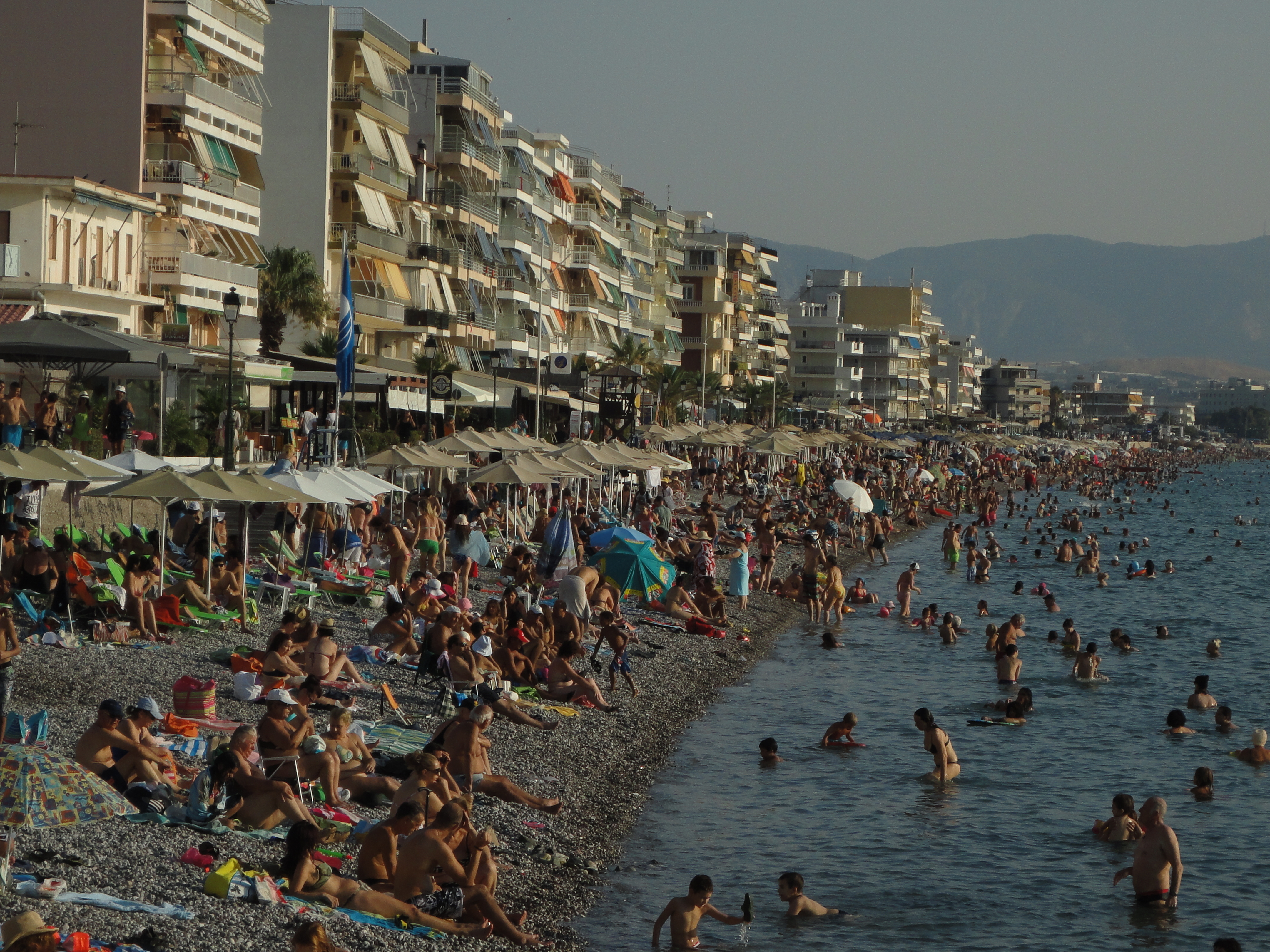 Loutraki Beach